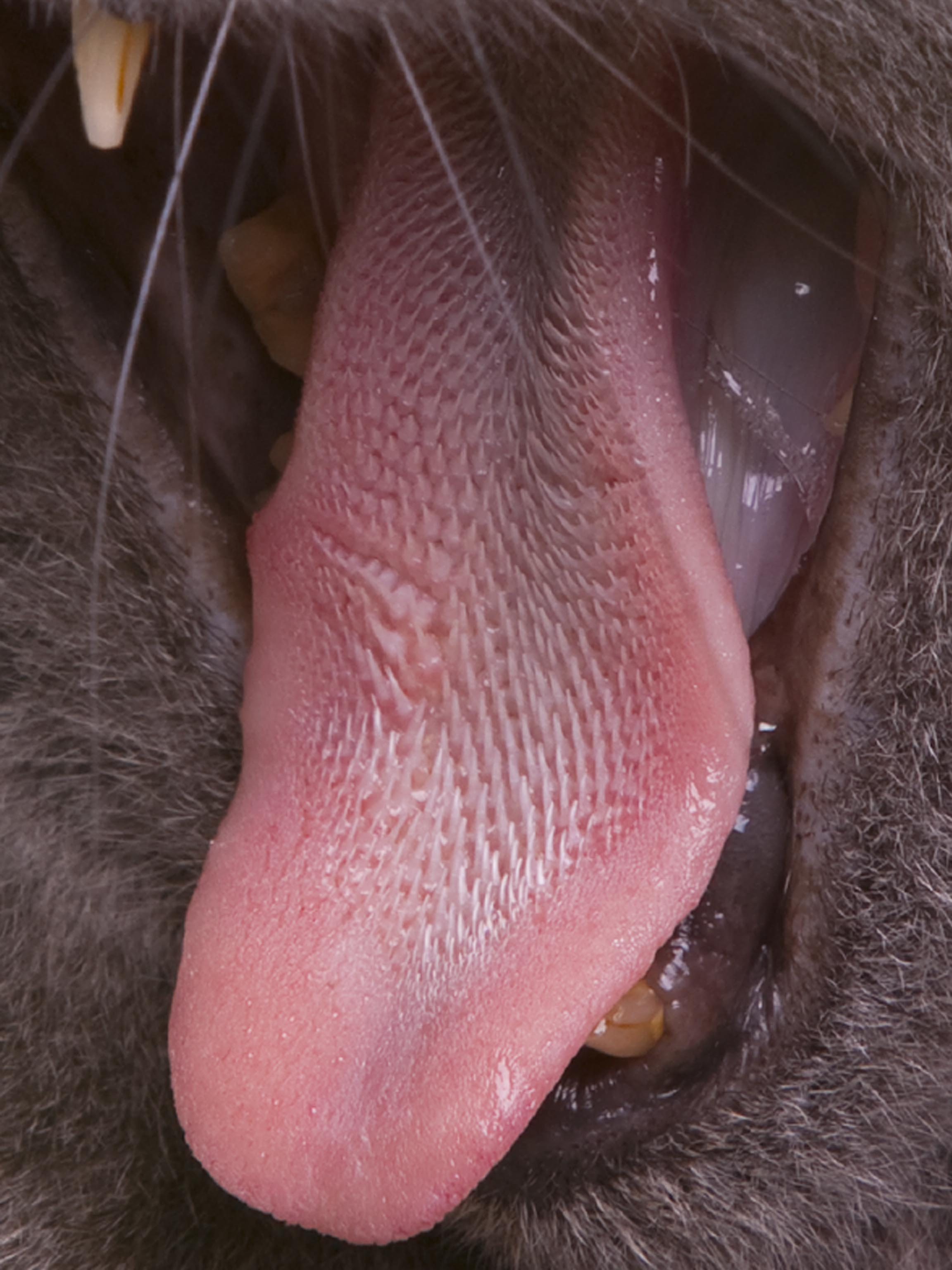 Zunge einer Hauskatze